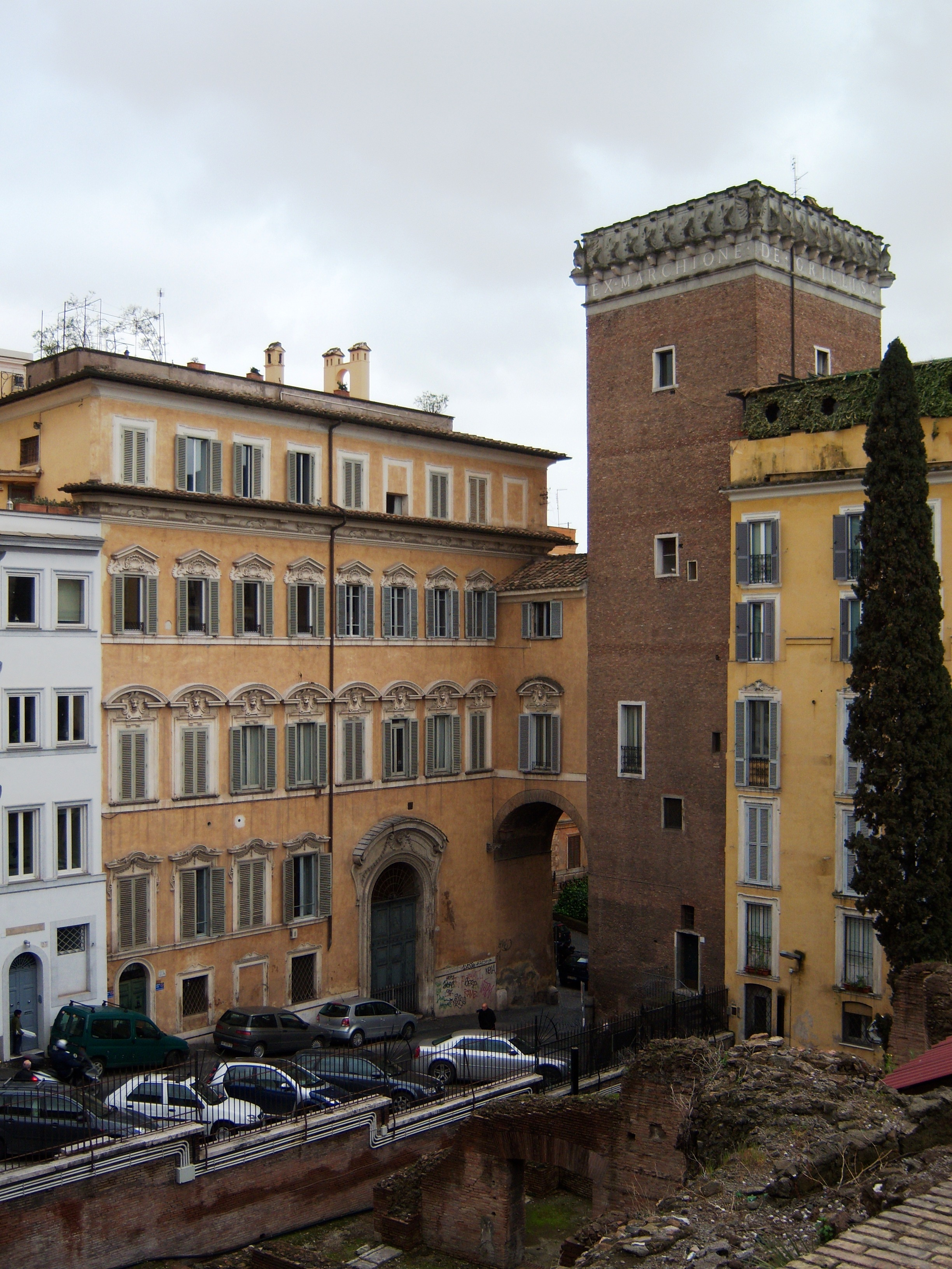 Palazzo del Grillo, Roma (Italia).